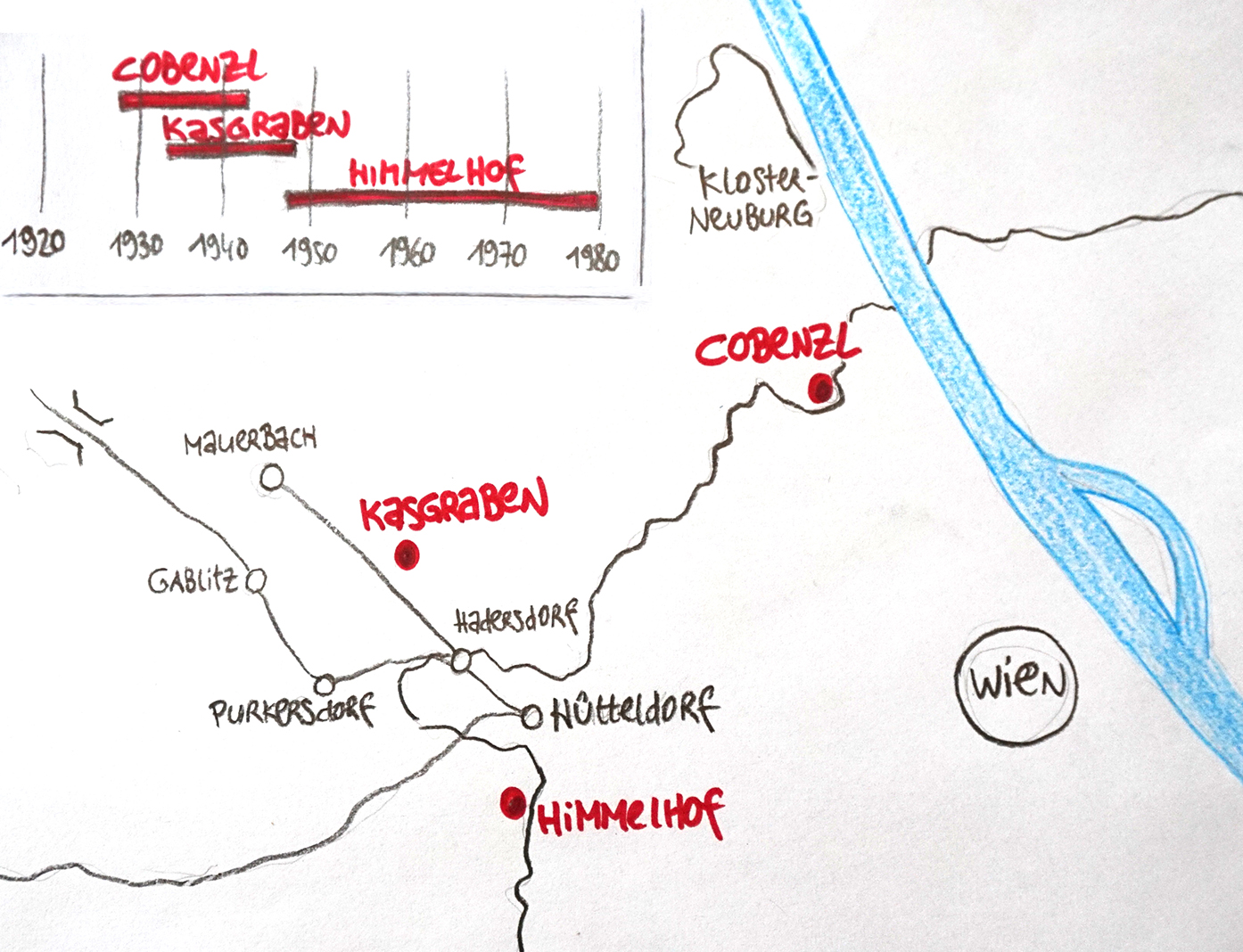 Lageplan der Wiener Skisprungschanzen 1931-1980. Skizze über Landkarte, links oben Zeitachse.